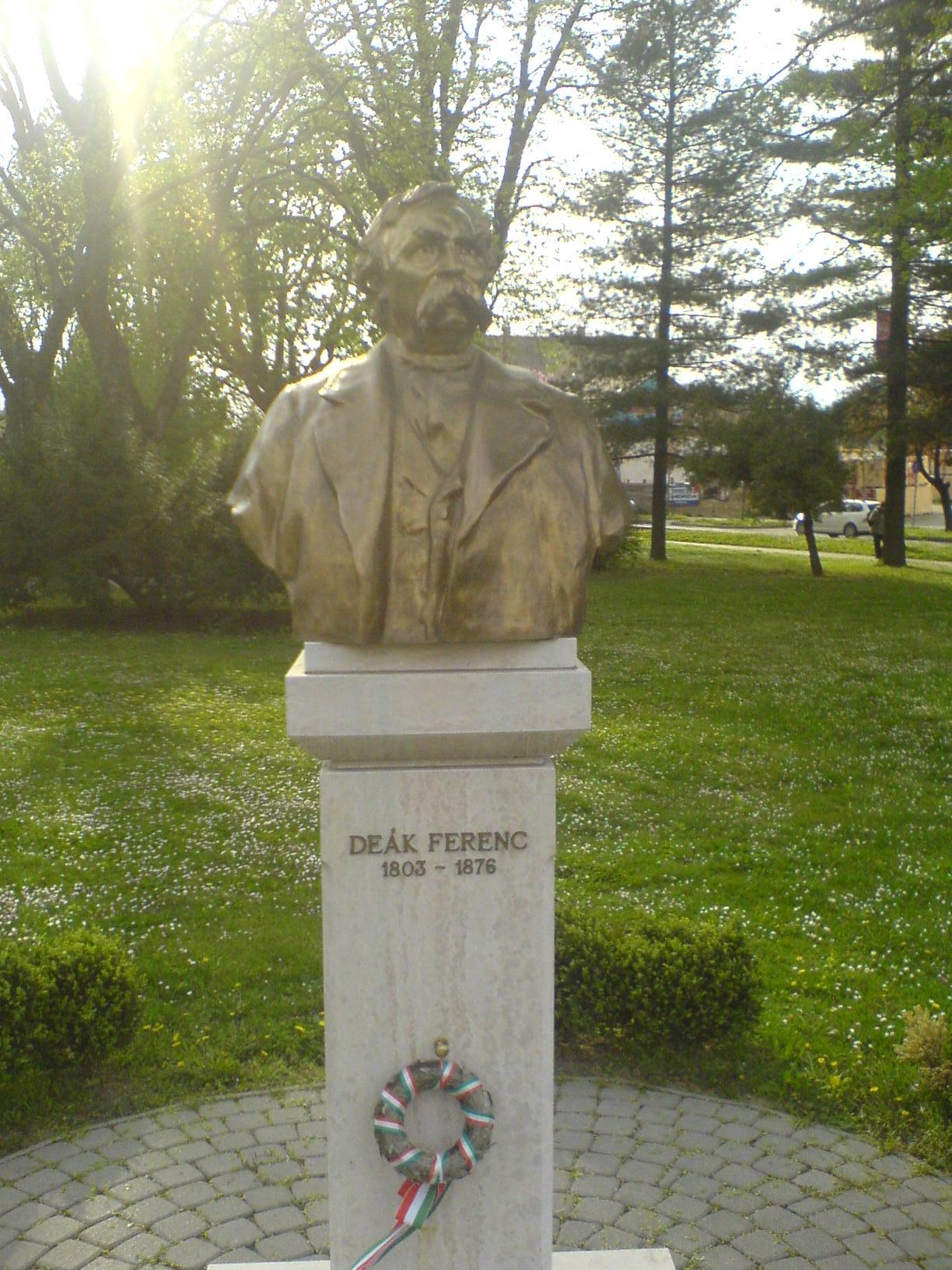 Deák Ferenc mellszobra Nagykanizsán az Eötvös téren. Fischer György alkotása (1997)